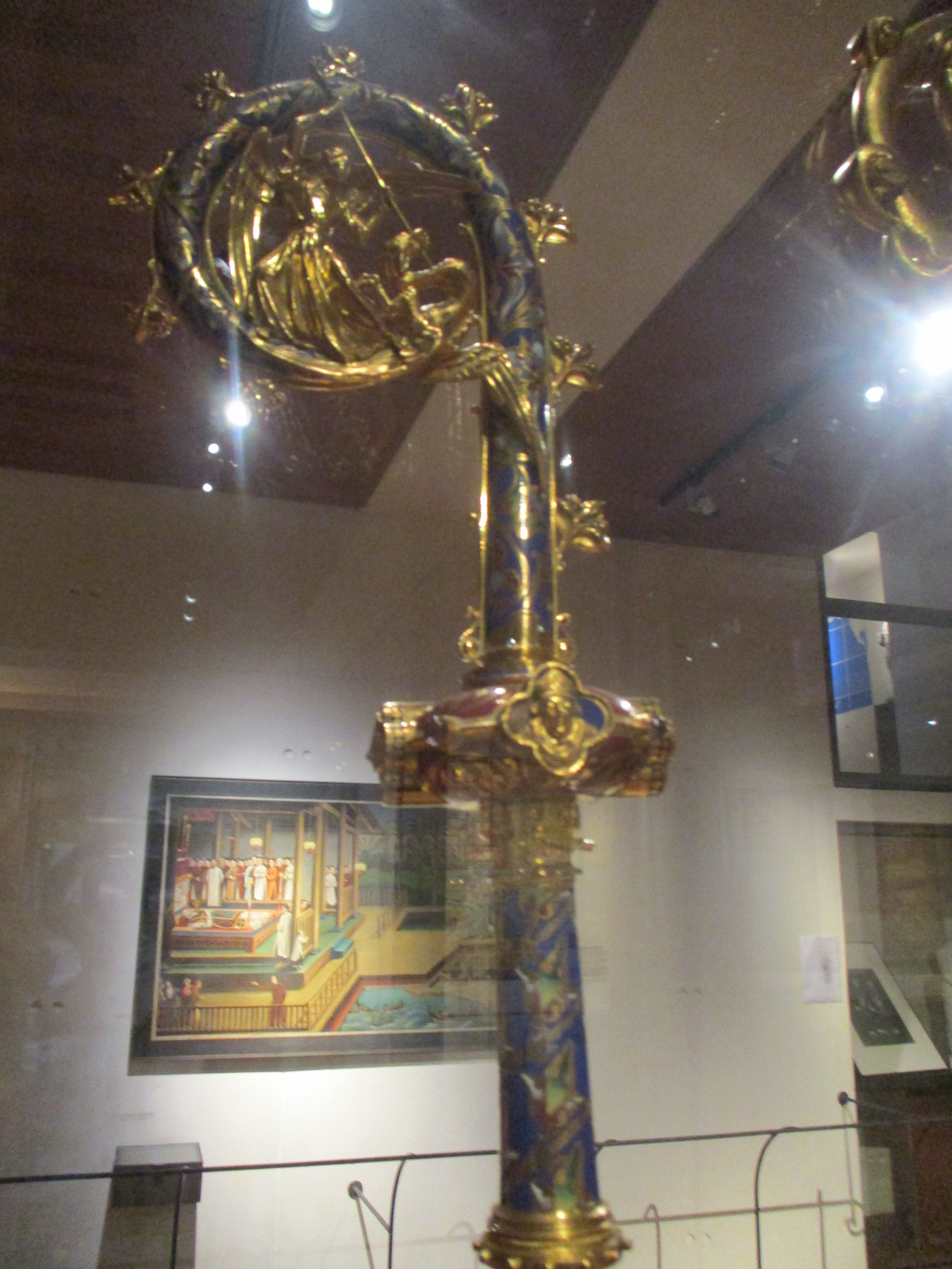 Crosse de Mgr Guillon (1854-1900), vicaire apostolique de Mandchourie, décapité à Moukden. Crypte des missions étrangères de Paris.